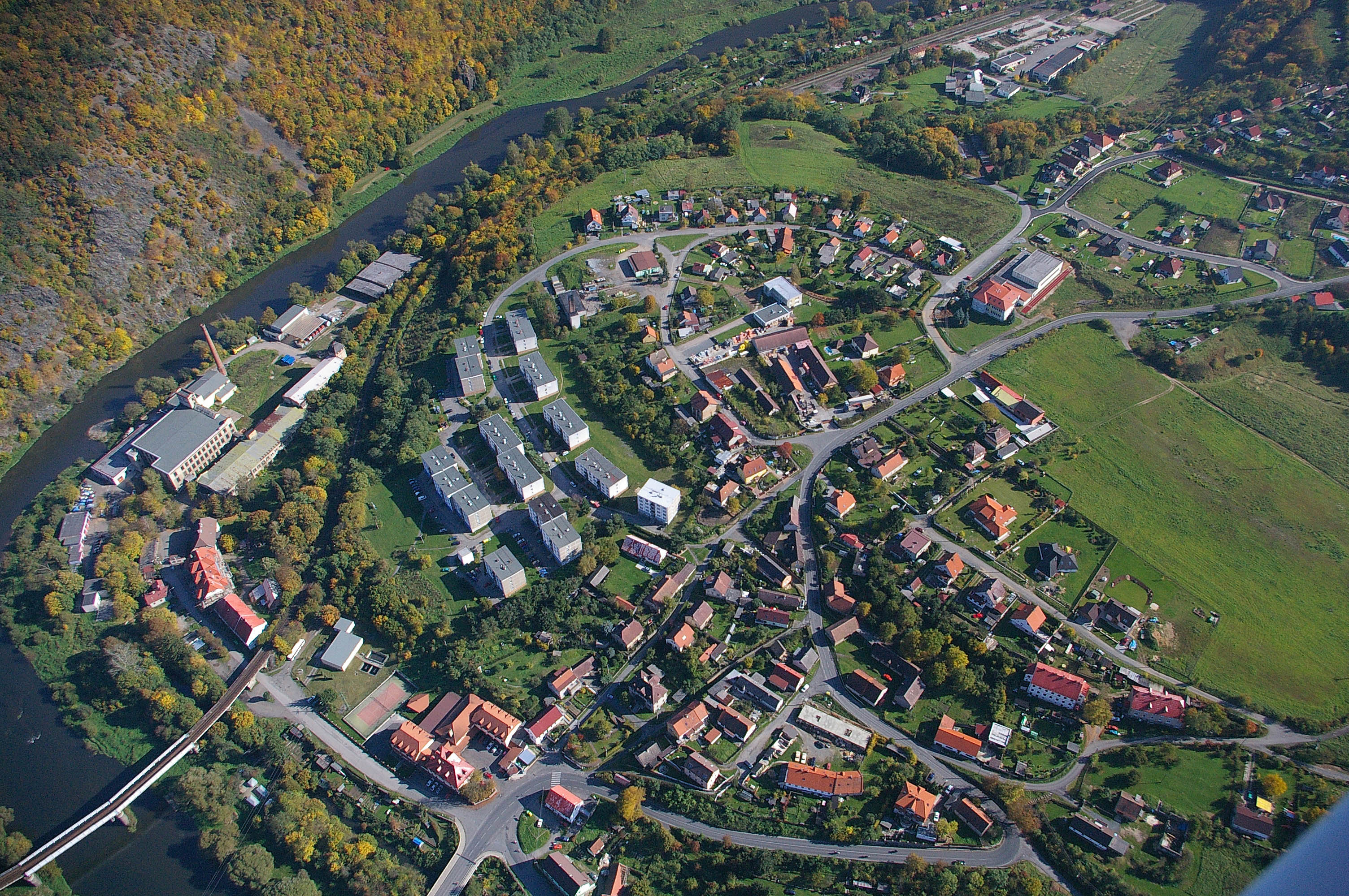 Roztoky u Křivoklátu